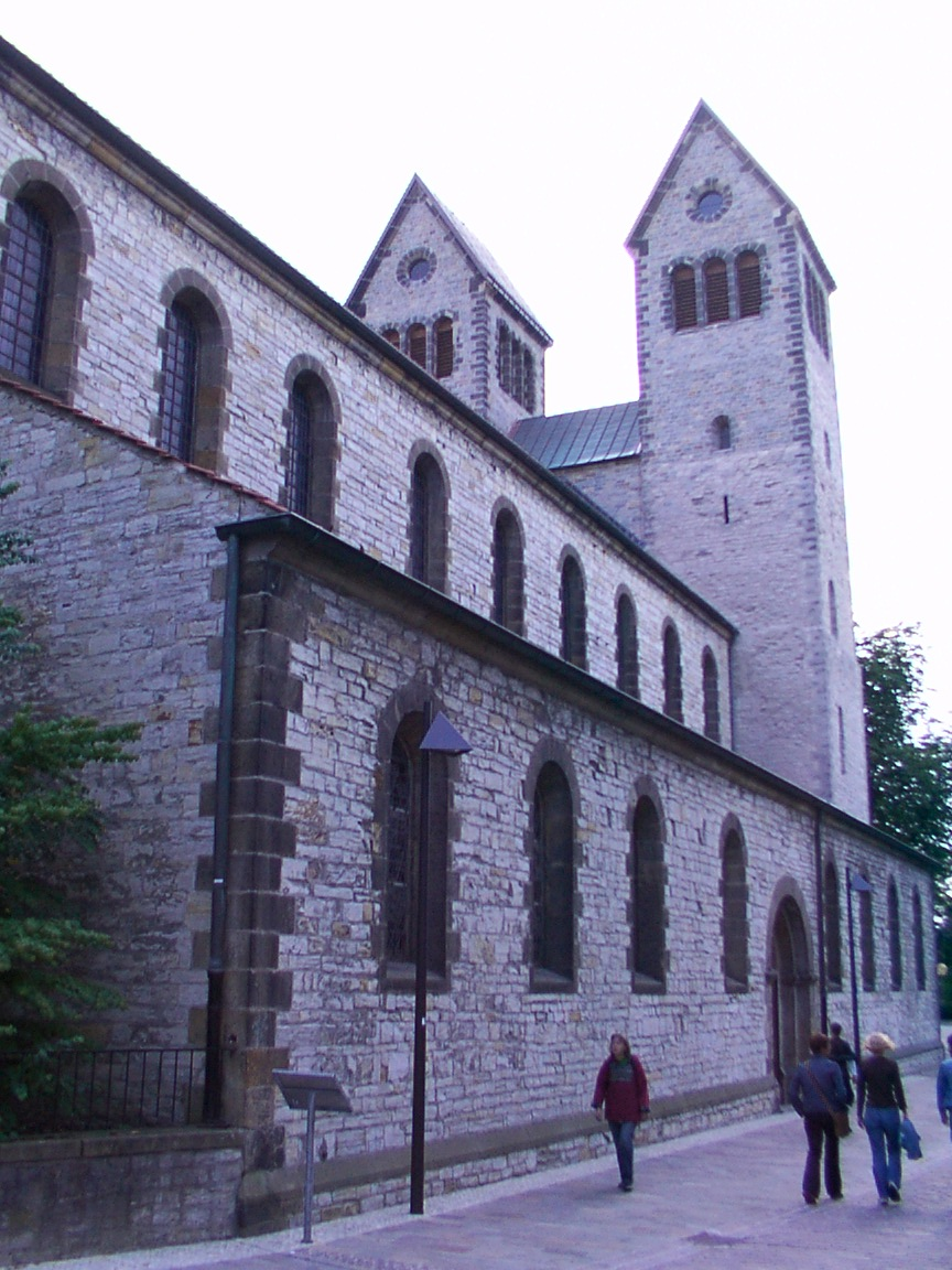 Paderborn: Abdinghofkirche, von Nordost gesehen